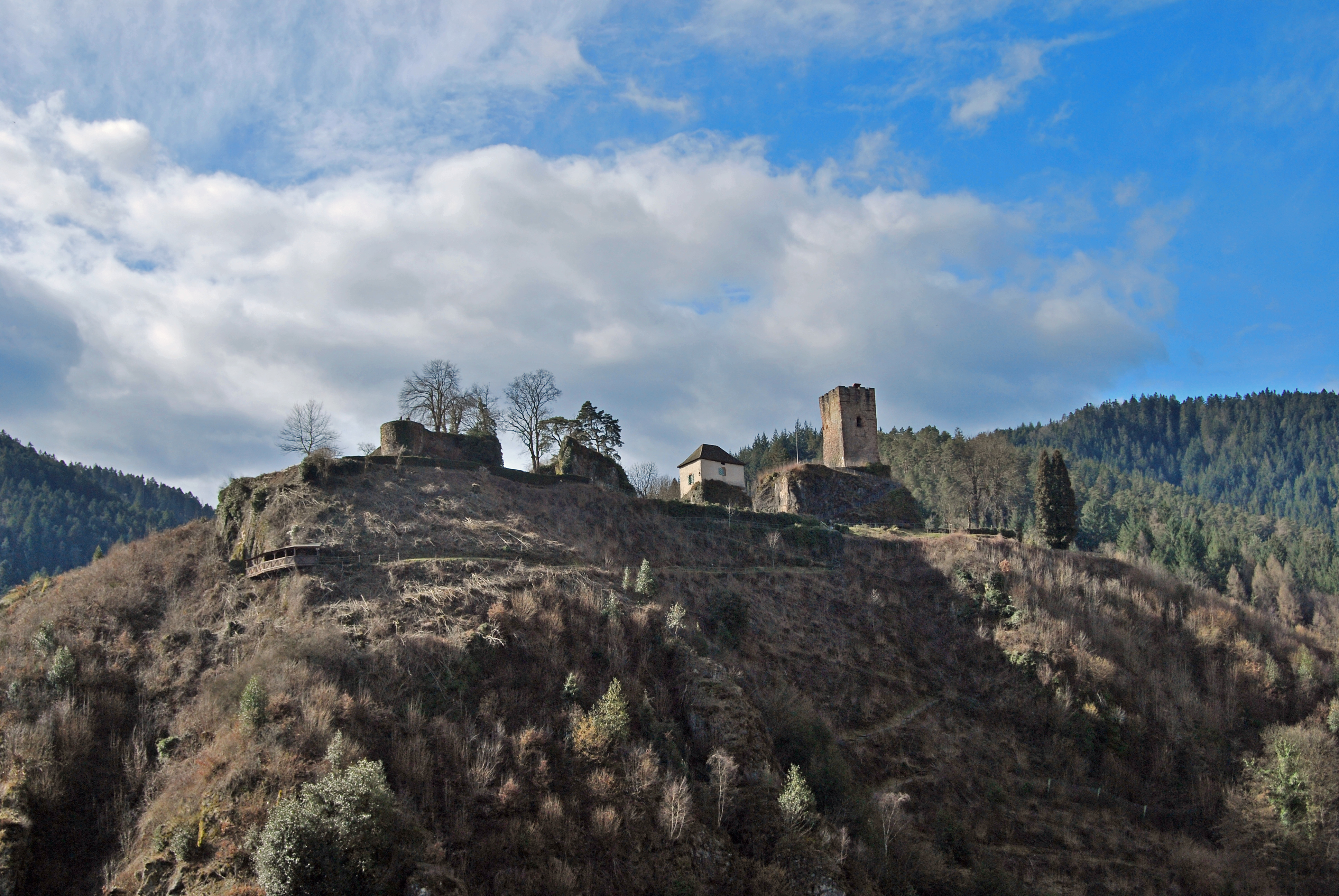 Burg Hornberg (Schwarzwald)